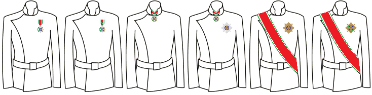 Modo di indossare le decorazioni dell'Ordine della Stella d'Italia (Repubblica Italiana)